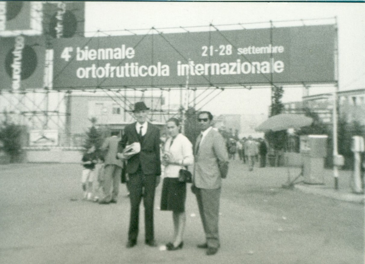 Immagine provenienti da mio archivio personale digitalizzato - visita alla Biennale